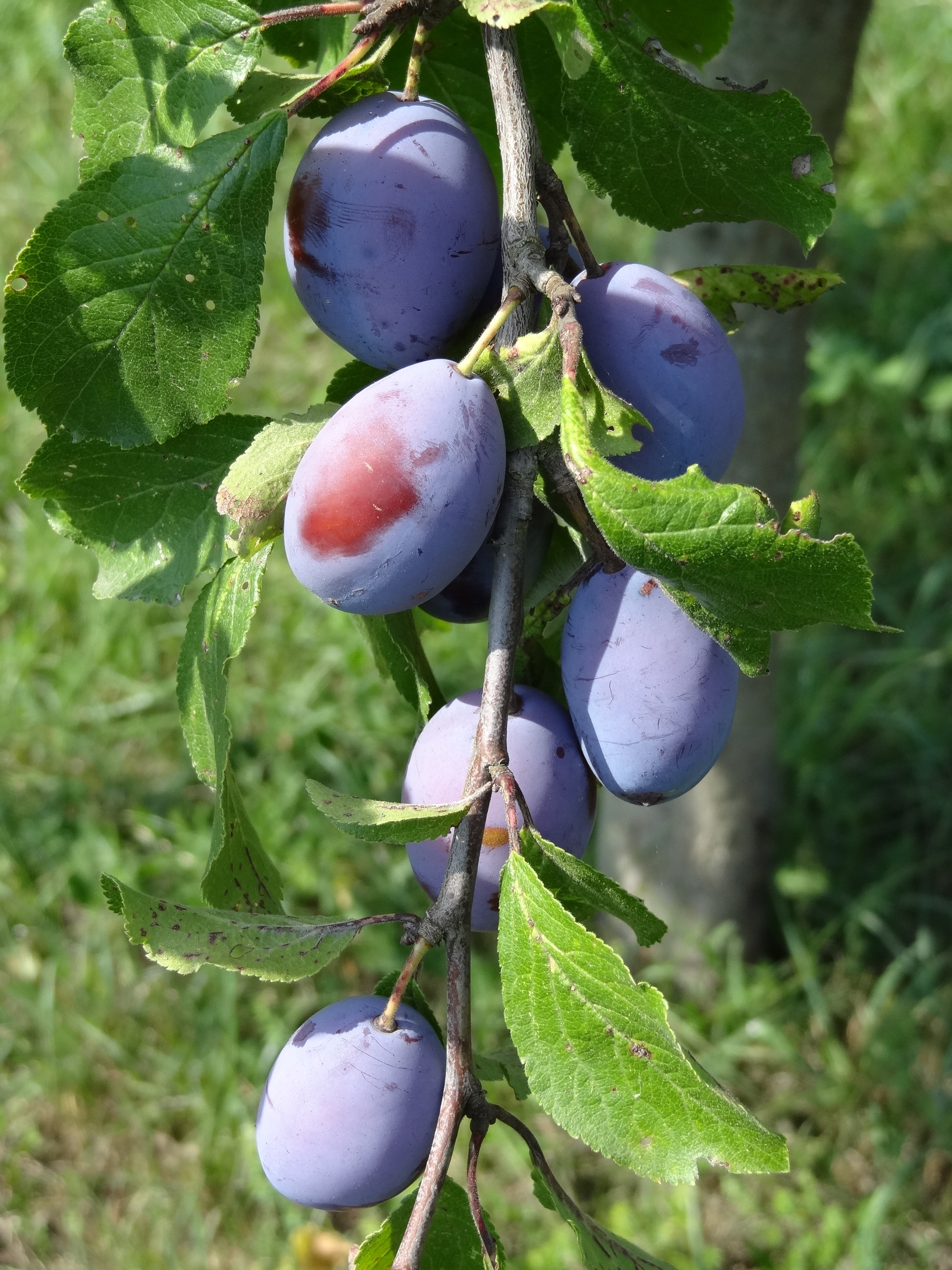 Zwetschgen 2013, Grüningen (Pohlheim)